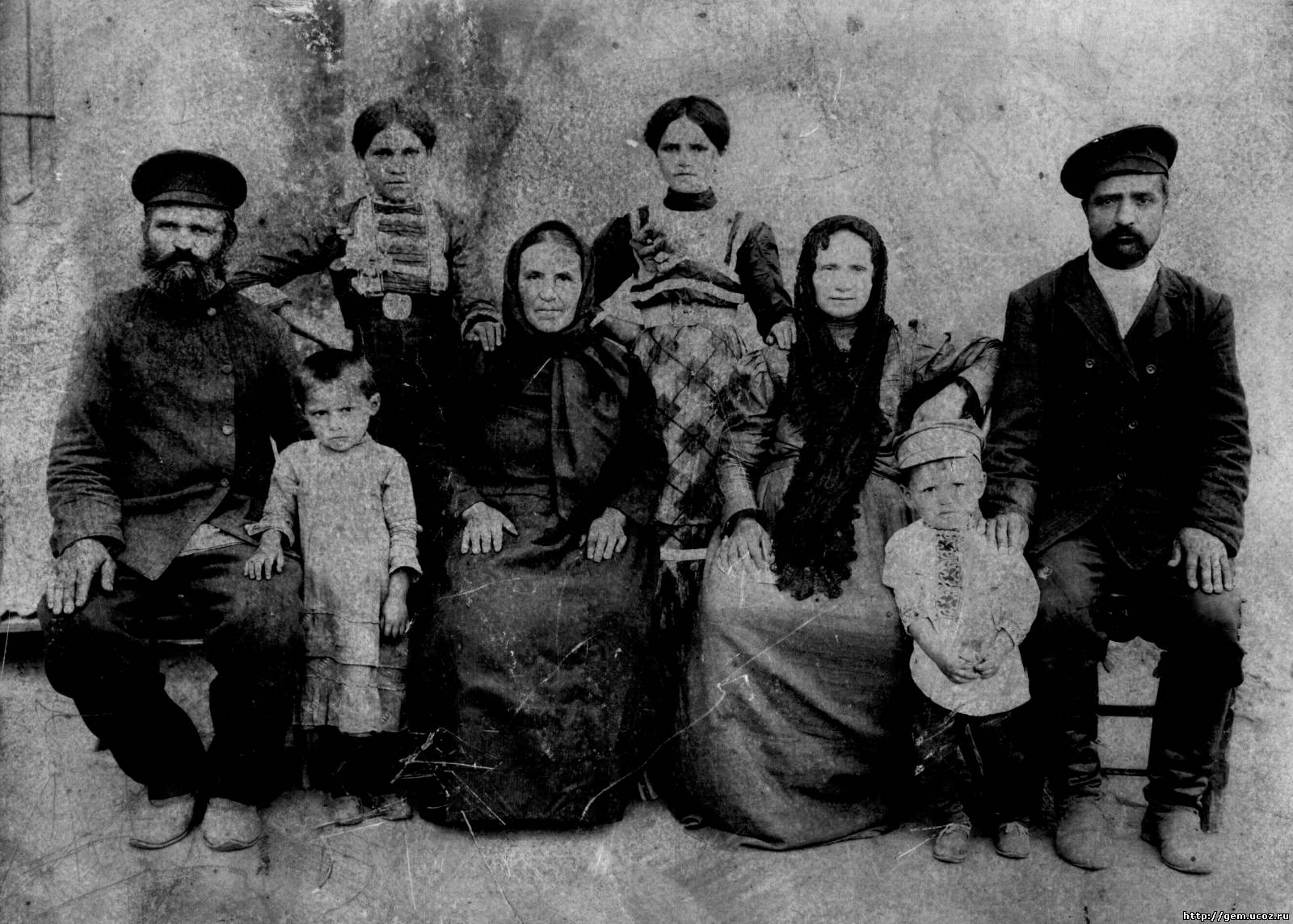 Сидят, слева на право: Максим Никифорович Емельяненко по его левую руку супруга: Василиса Андриановна Емельяненко (Кабакова). Справа на лево: Андрей Максимович Емельяненко, по правую руку от него Александра Леонтьевна Емельяненко (Репкина).